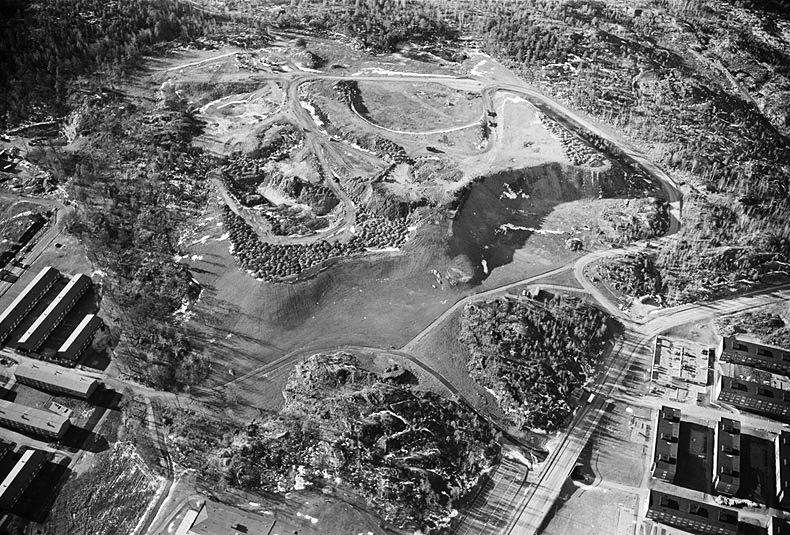 Vårbergstippen. Vårberg, Vårby gård. Motiv: Vårberg Nyckelord: Flygbilder, Riksintressen Kategori: Villastad/villasamhälle Vårbergstippen. Vårberg, Vårby gård.